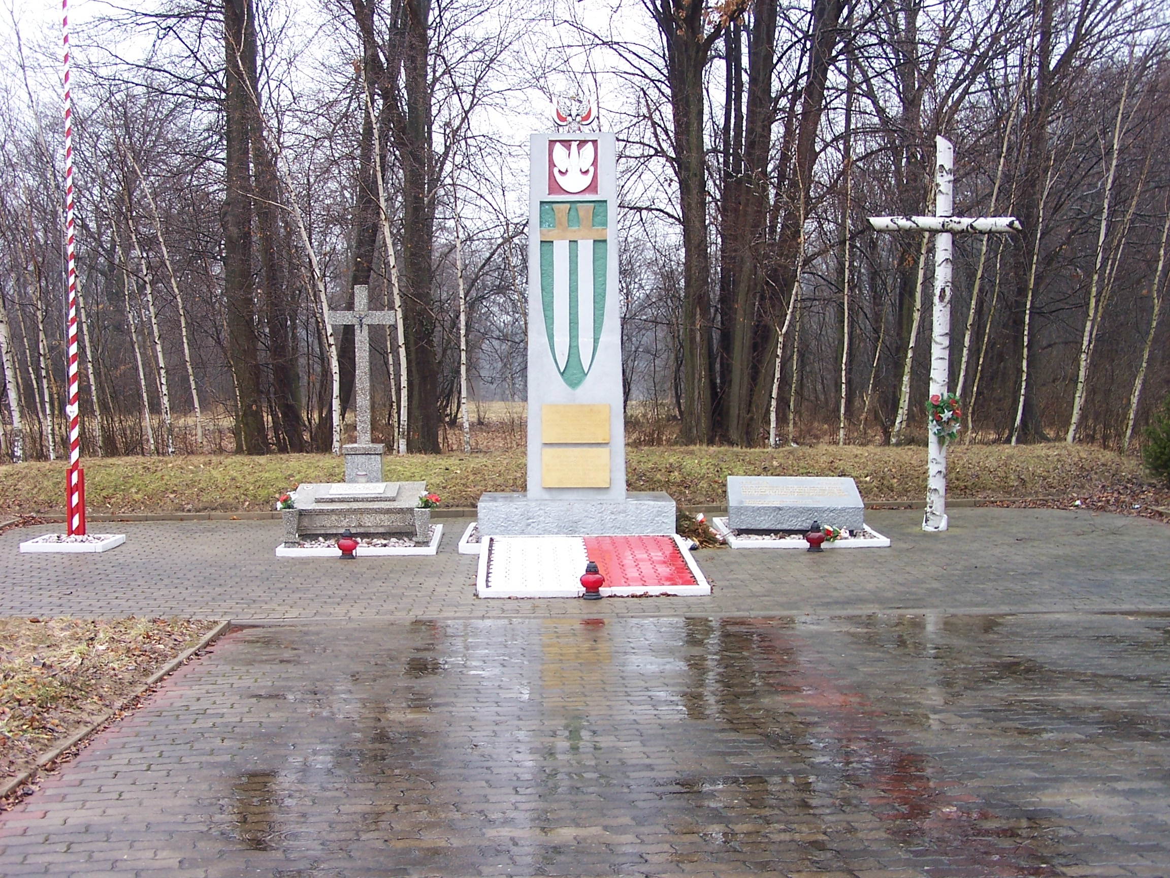 Gębice - pomnik poświęcony więźniom stalagu III B Amtiz